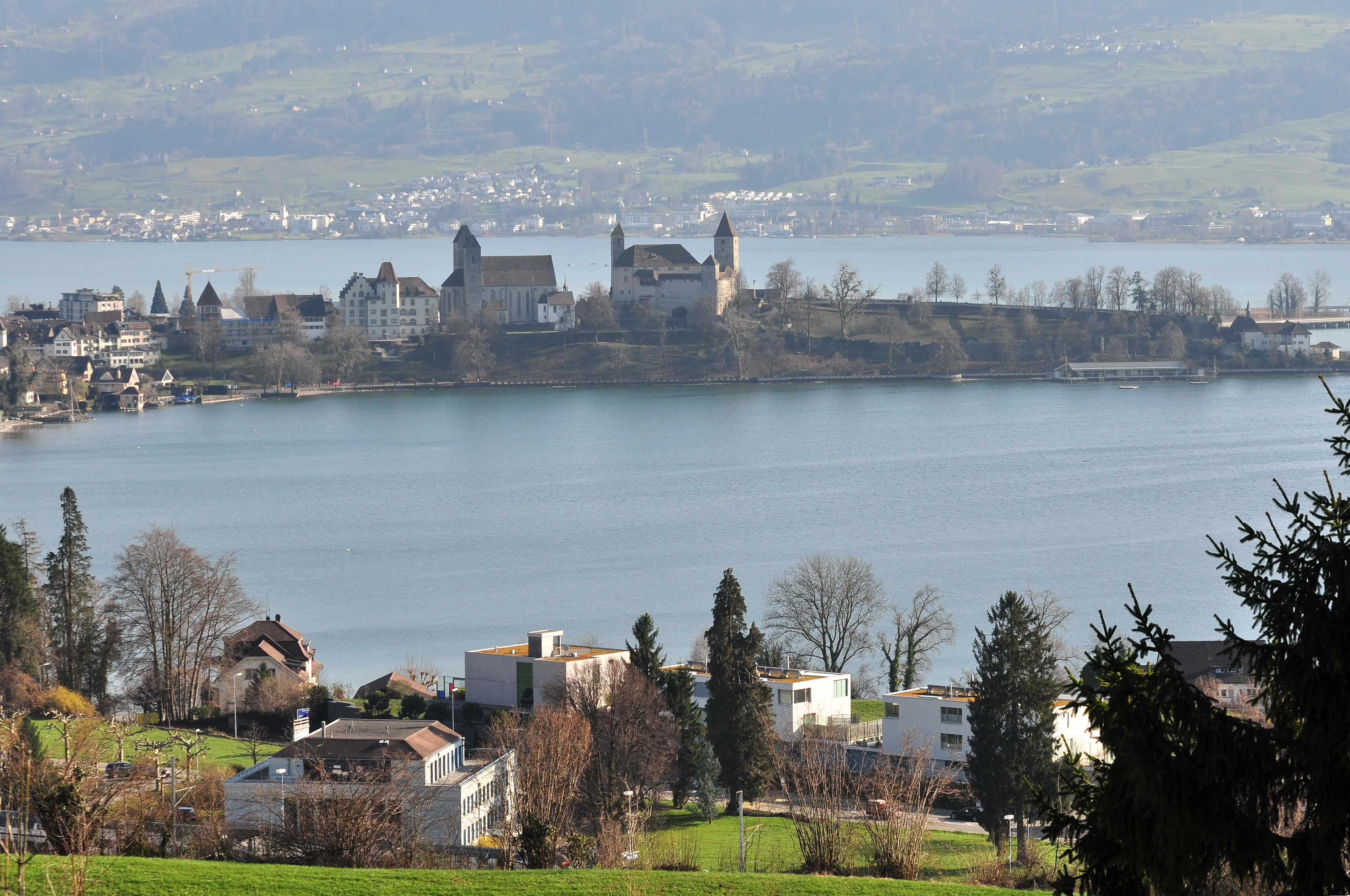 Kempratner Bucht (Bay of Kempraten) and Herrenberg and Lindenhof in Rapperswil (Switzerland) : Stadtmuseum, Stadtpfarrkirche St. Johann (St. John's Church), Liebfrauenkapelle and Schloss Rapperswil, as seen from Kempraten, Obersee and Seedamm in the background.